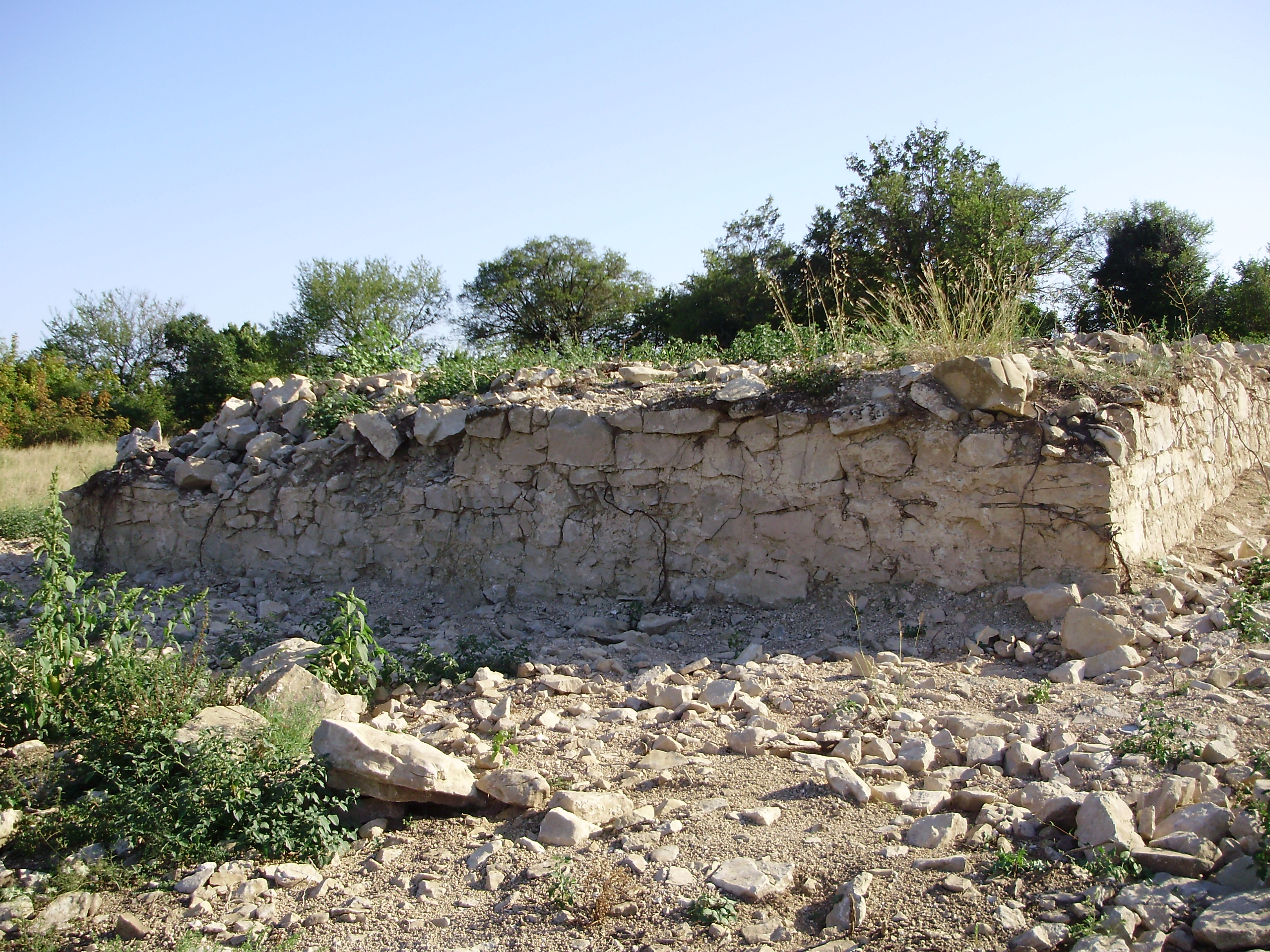 Ruševine na lokalitetu Dobra Voda